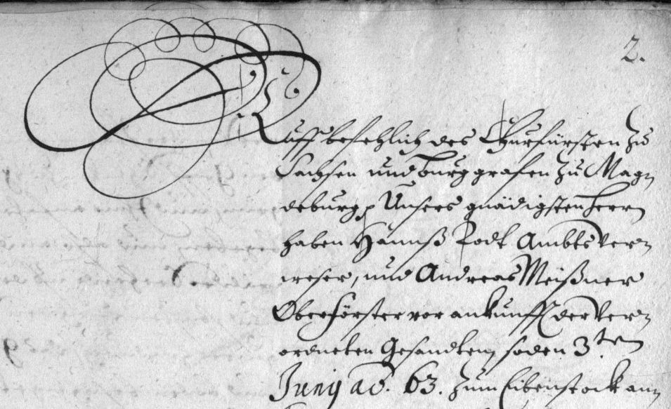 Hans Todt war Mitte des 16. Jahrhunderts Amtsverwalter im Amt Schwarzenberg. In einem Bericht an den Kurfürsten vom Juni 1563 wegen des Kaufs von Neustädtel bei Schneeberg und sowie der beiden Dörfer Schönheide und Stützengrün, die Balthasar Friedrich Edler von der Planitz einschließlich großer bis zur böhmischen Grenze reichender Wälder dem Kurfürsten August zu Kauf angeboten hatte, bezeichnet sich Hans Todt am Anfang als Amtsverweser und in der Unterschrift als Amtsverwalter. In diesem Bericht wird sein Vorname mit Hanns bezeichnet. Dies ist ein Teil der ersten Seite des Berichts. Der abgebildete Textausschnitt lautet: „Auf befehlich des Churfürsten zu / Sachsen und Burggrafen zu Mag- / deburg, Unsers gnädigsten Herr / haben Hannß Todt Amtbtsver- / weser, und Andreas Meißner / Oberförster vor ankunfft der Ver- / ordneten Gesandten, soden 3ten / Juny ad 63 Zum Eibenstock an“s. Abdruck des vollständigen Berichts bei Gottfried August Arndt: Archiv der Sächsischen Geschichte, 2. Teil, Leipzig 1785, Seiten 383–388 (Link zum Digitalisat)